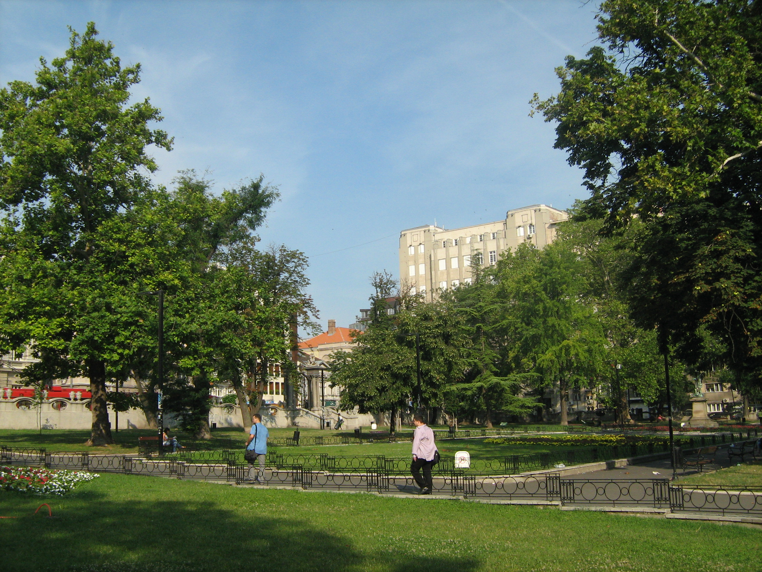 Akademski park